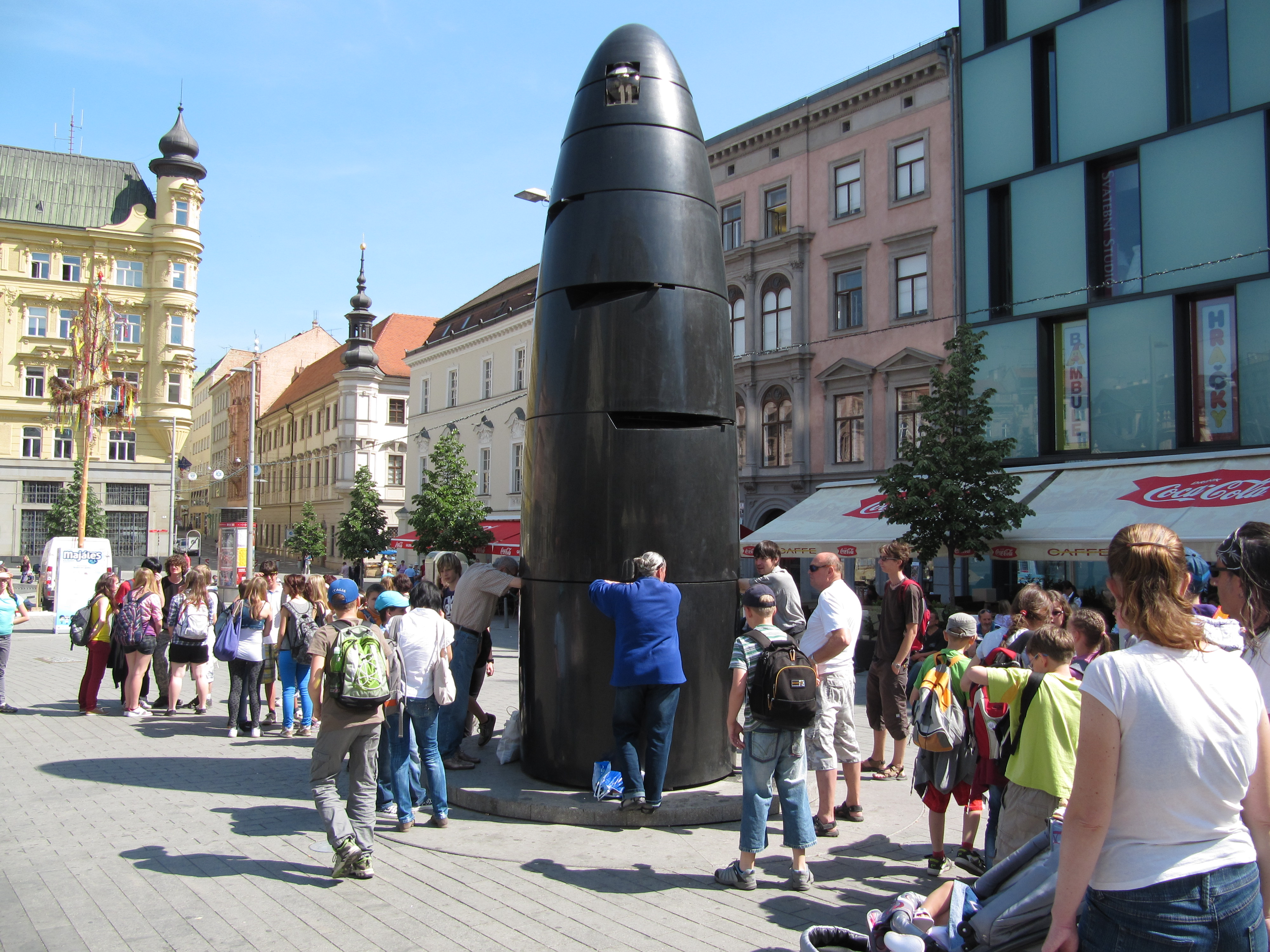 Brno, orloj, 11 hodin.